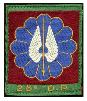 Insigne de bras en tissu de la 25e division parachutiste française